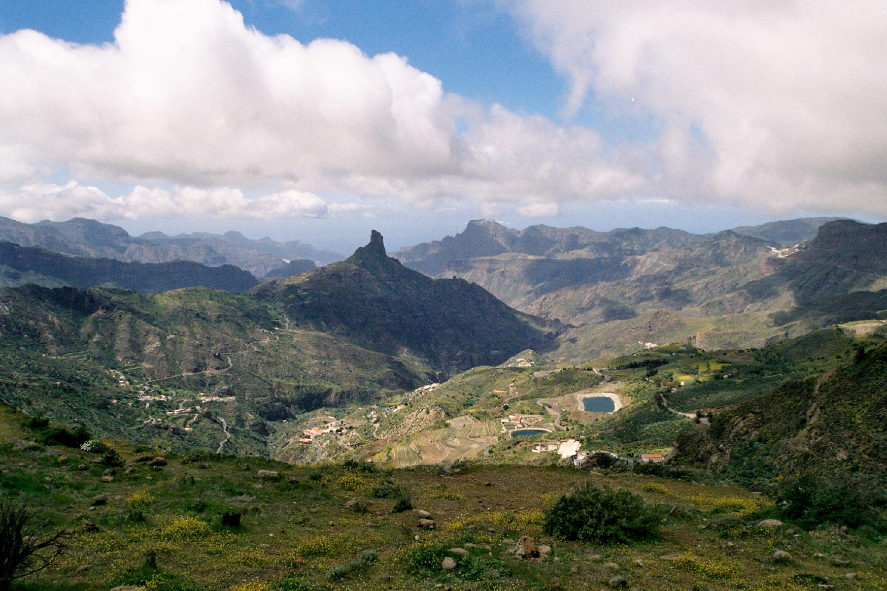 La ruta de la Cumbre, parte de la Cruz de Tejeda.Negative0-13(1)a